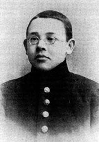 Isaac Babel in 1908